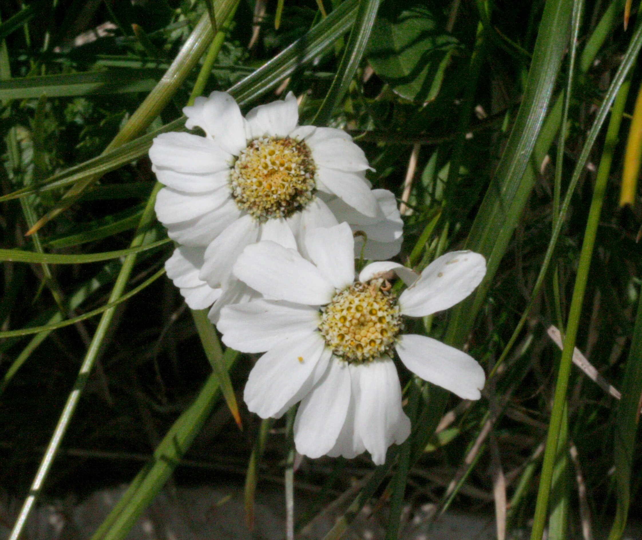 Achillea barrelieri subsp. oxyloba - Località: Passo di Falzarego, Cortina (BL), 2105 m s.l.m.